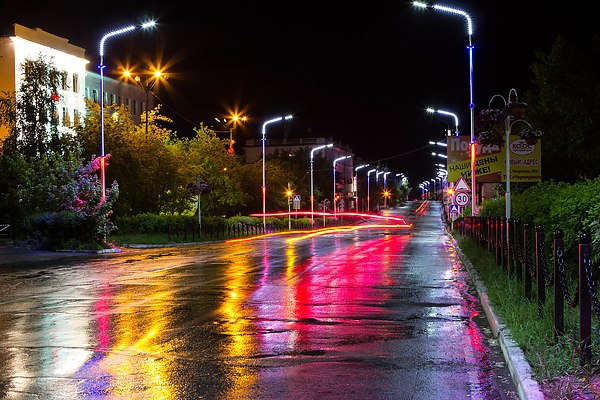 ул. Ленина г. Черемхово